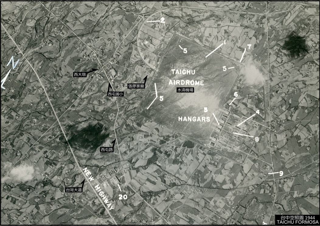 中文（台灣）: 台中西屯1944空照圖